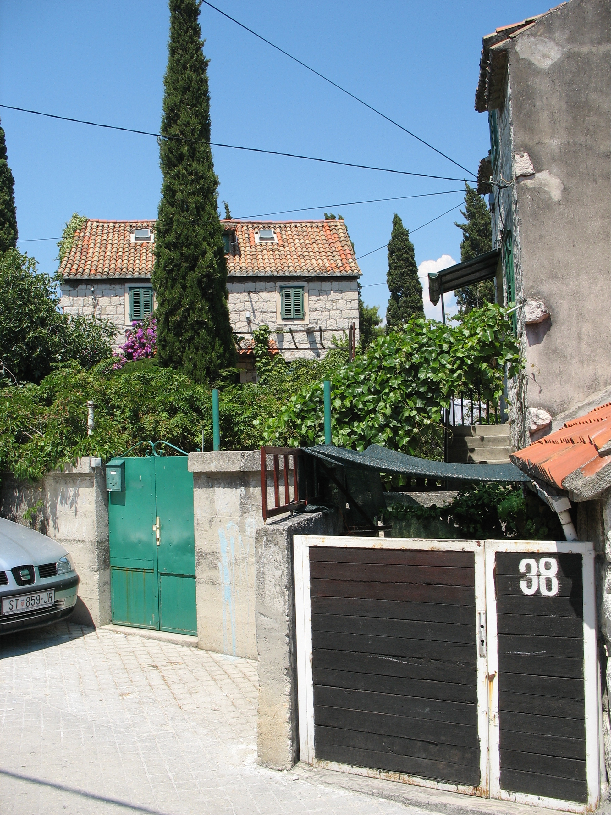 Split, Veli Varoš, Kamenita ulica.